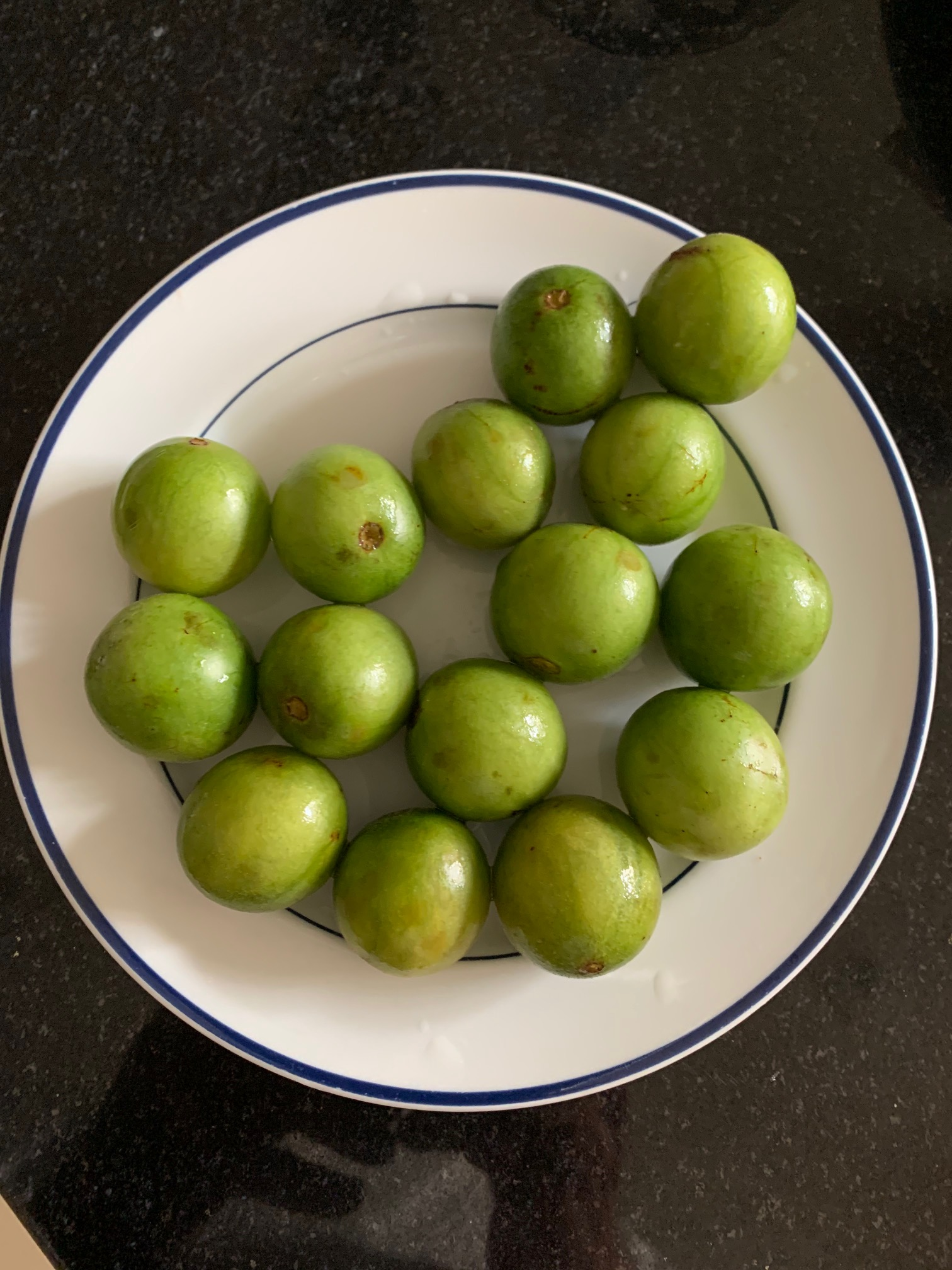 Spondias tuberosa L., popularmente conhecido como umbuzeiro, imbuzeiro ou jique é uma árvore de pequeno porte (mede até seis metros de altura), pertencente à família das anacardiáceas, de copa larga (até quinze metros de largura), originária dos chapadões semiáridos do Nordeste brasileiro